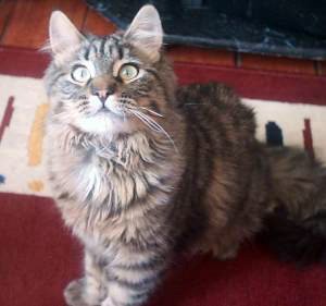 Gato siberiano cachorro. Con siete meses ya presenta abundante pelaje, especialmente alrededor de su cuello.